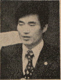 이기택은 대한민국의 학생운동가·정치인이다.